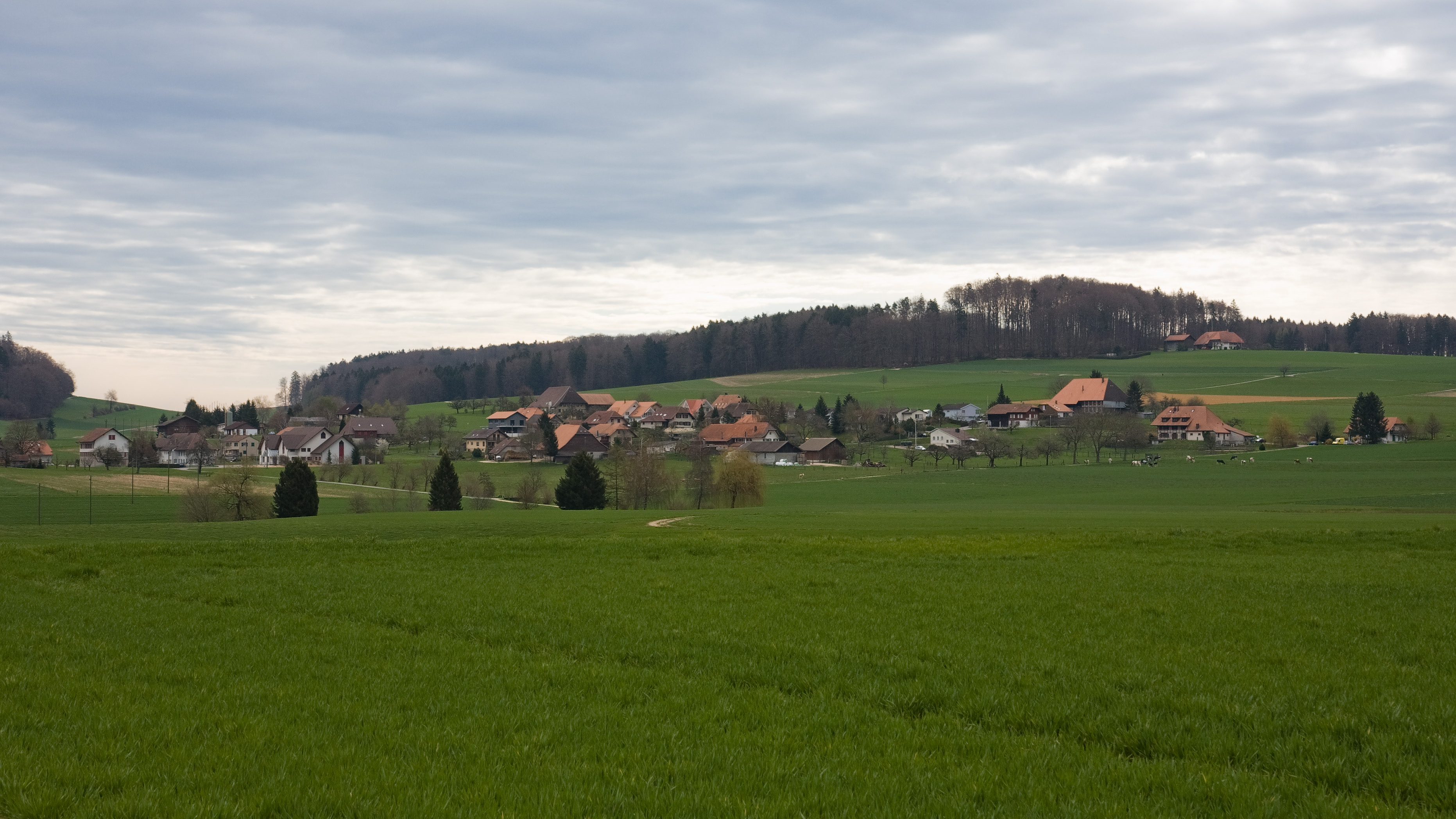 Landschaft mit Dorf: Lüterswil, Kanton Solothurn, Schweiz